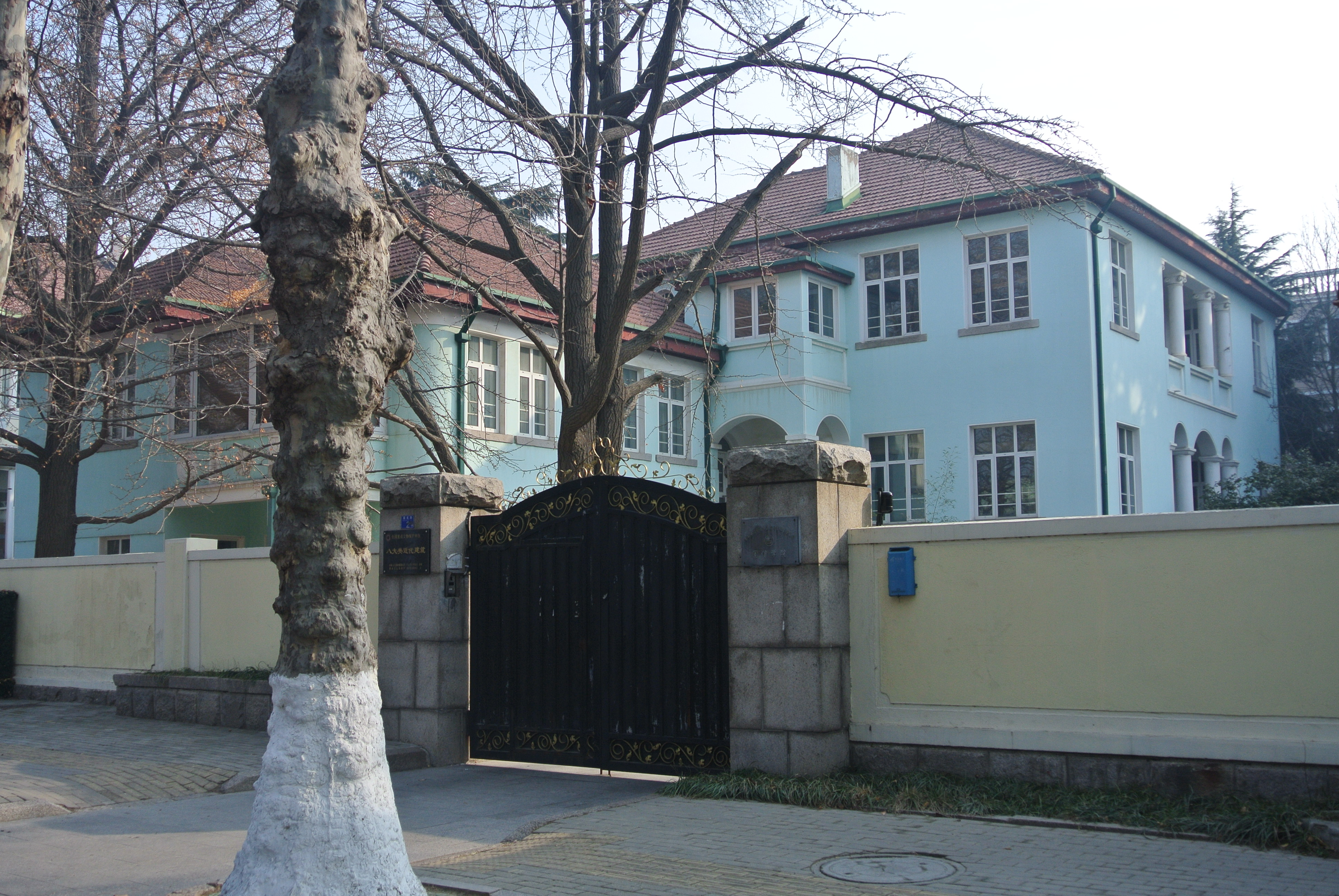 青岛荣成路2号甲李代芳旧居